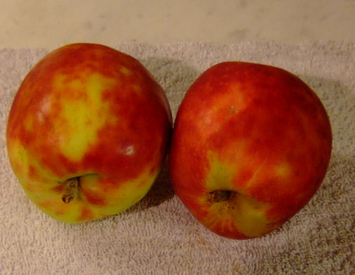 Gravenstein, Norwegian type